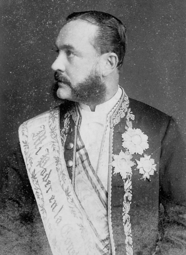 El presidente de la República del Ecuador, José María Plácido Caamaño, en la fotografía que serviría para elaborar el retrato presidencial oficial (1888)